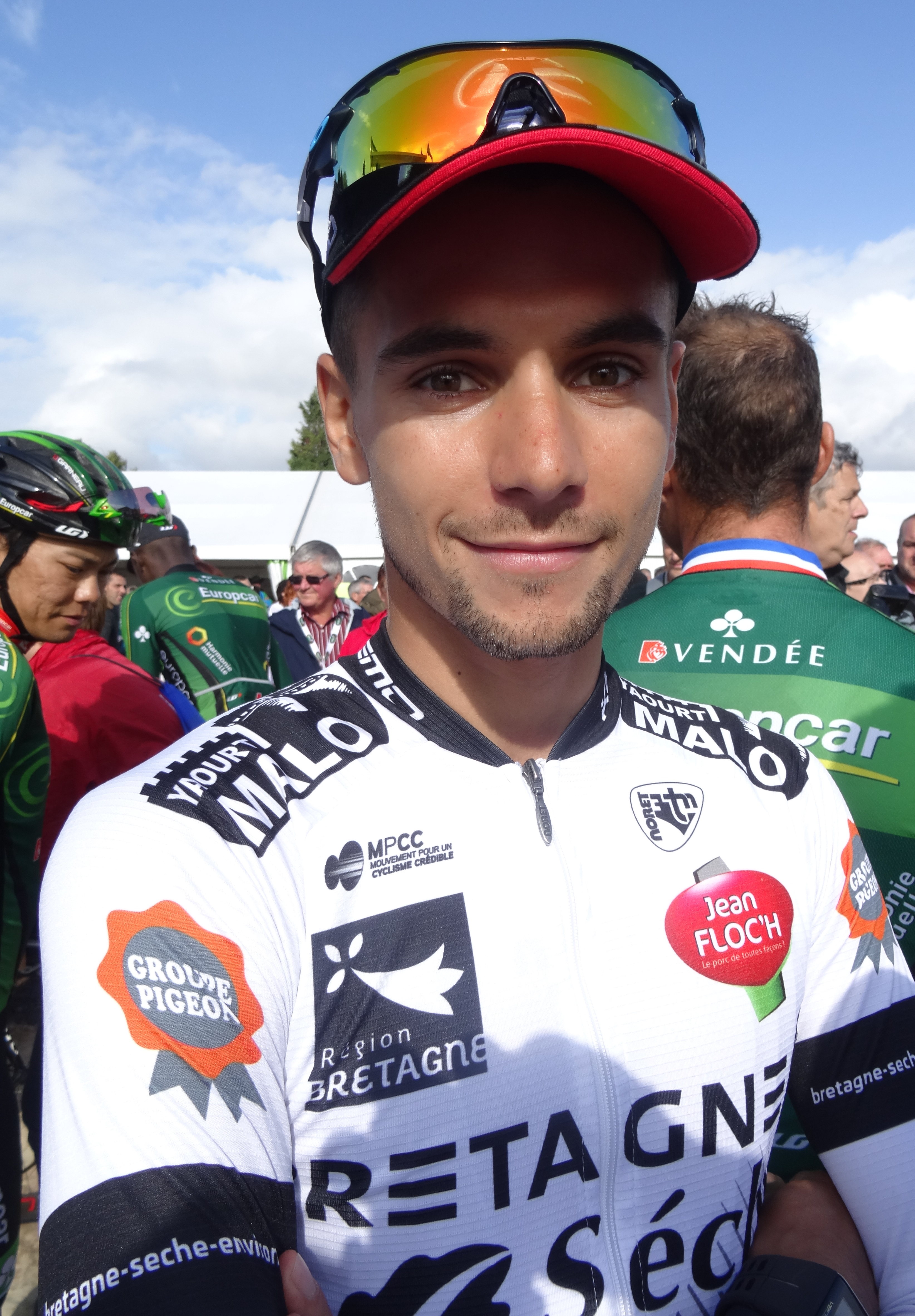 Reportage réalisé le dimanche 21 septembre à l'occasion du départ et de l'arrivée du Grand Prix d'Isbergues 2014 à Isbergues, Nord-Pas-de-Calais, France.